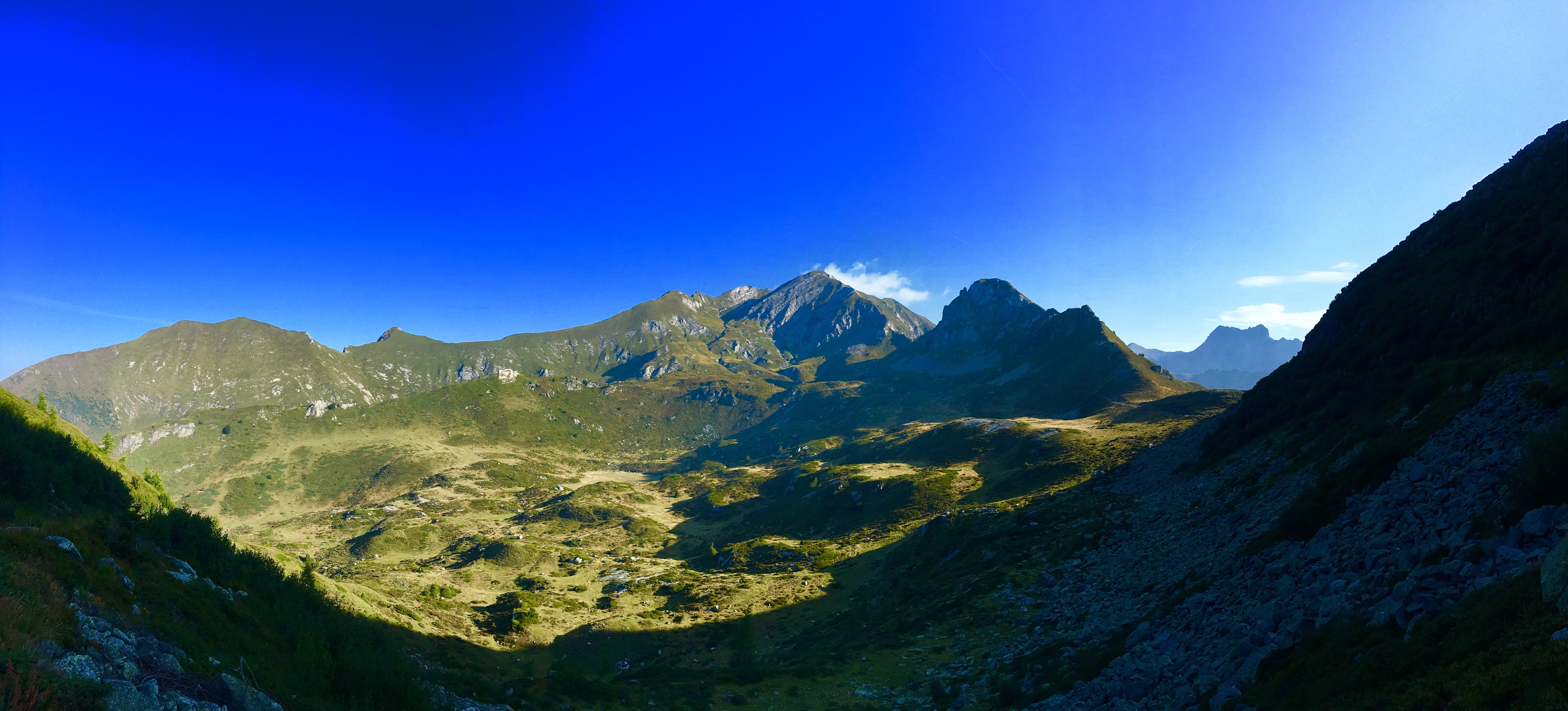 Parco Naturale Adamello (Q47780554)